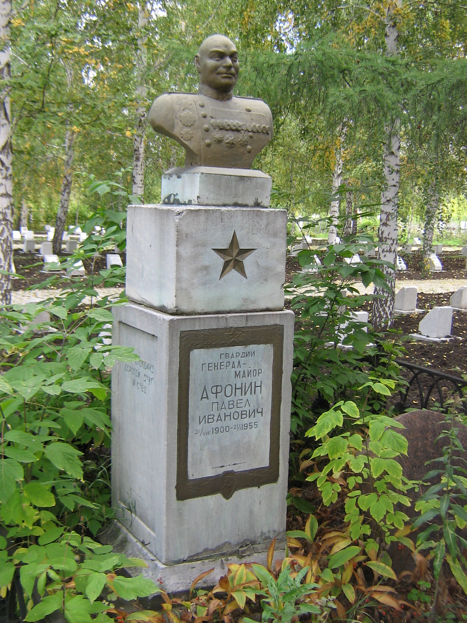 Памятник на могиле гвардии генерал-майора Афонина Павла Ивановича на Старо-северном мемориальном кладбище в Омске